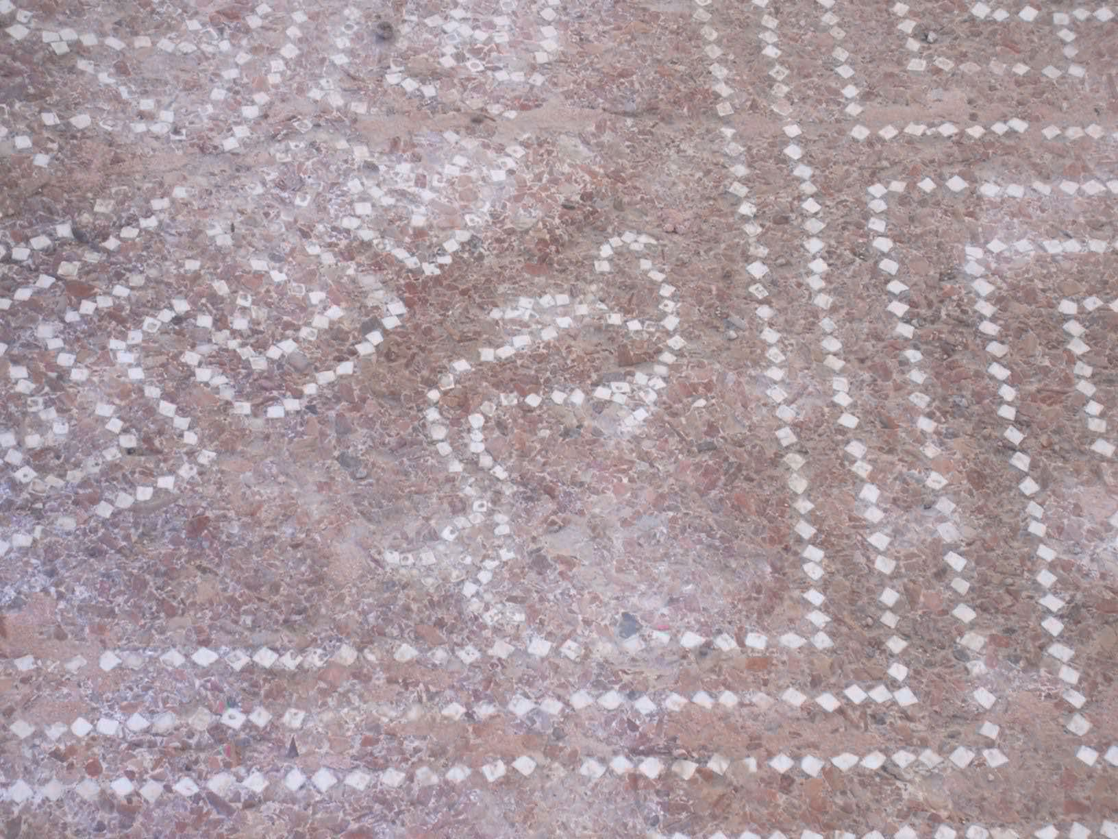 Colonia Victrix Iulia Lepida / Colonia Victrix Iulia Celsa (años 44 adC - 56) - Mosaico en la Casa de los Delfines